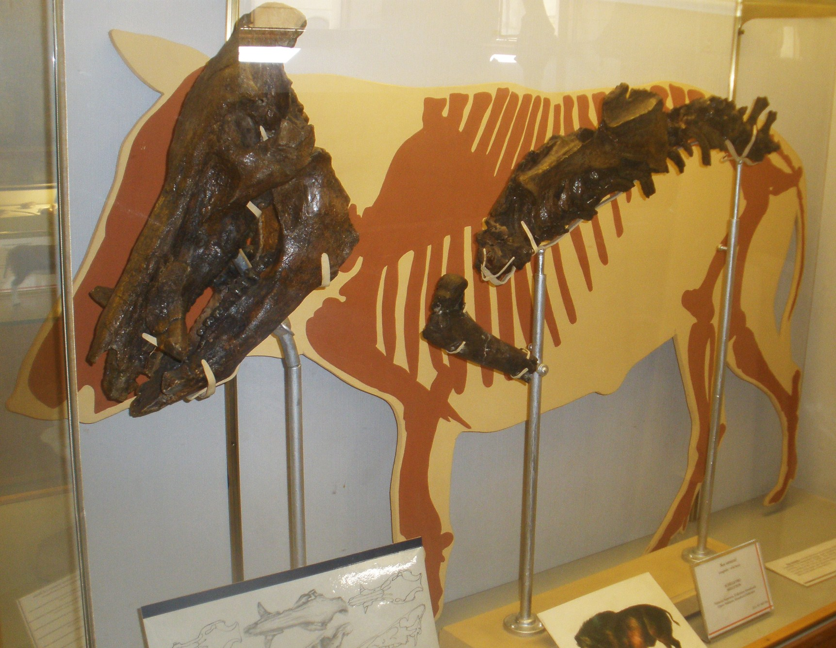 Fossil of Sus, an extinct mammal -- Topok the picture at Museo di Paleontologia di Firenze